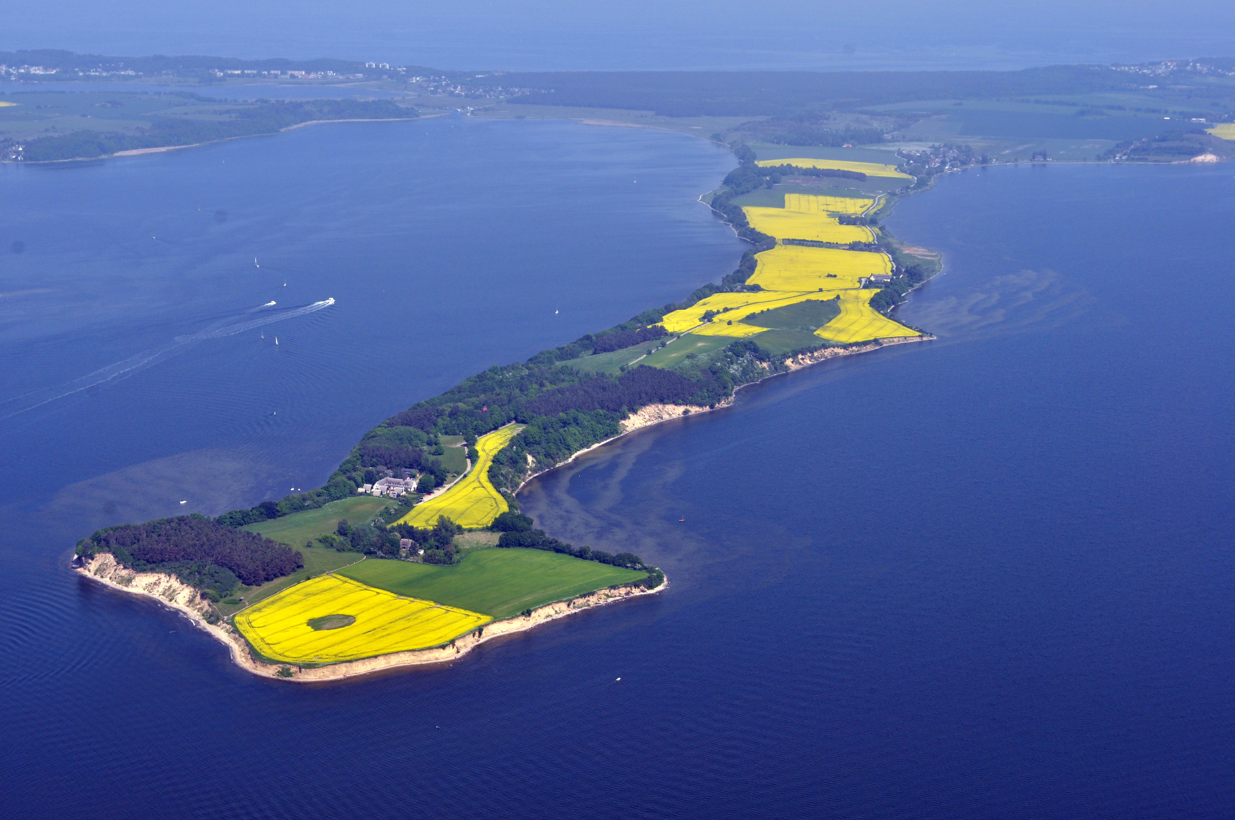 Die Bilder wurden von mir während eines einstündigen Rundflugs ab Flugplatz Güttin am 21. Mai 2011 aufgenommen. Die Bildbeschreibung steht im Dateinamen. Aufgenommen mit einer Nikon D5000 durch das Seitenfenster des Flugzeugs.